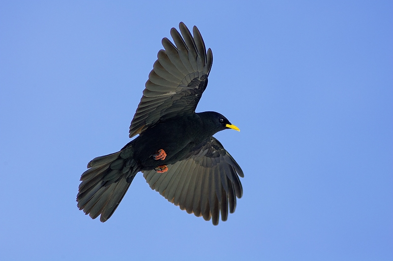 Pyrrhocorax graculus, Dolomiti, Col Verde